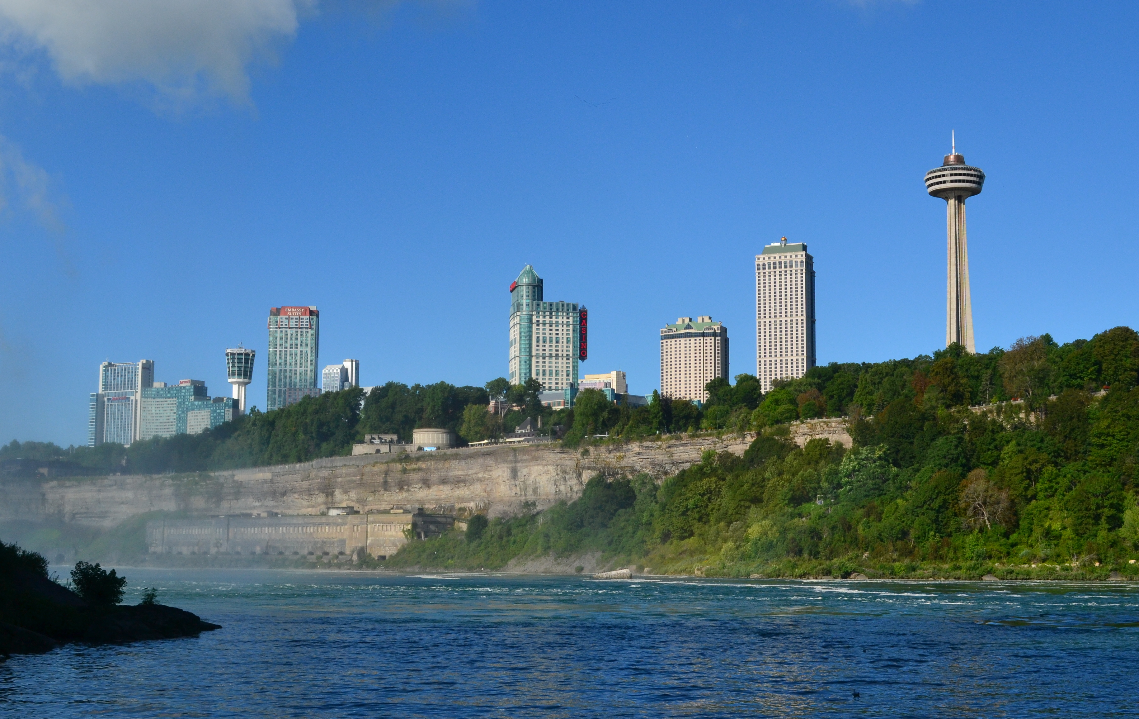 Niagara Falls, Ontario